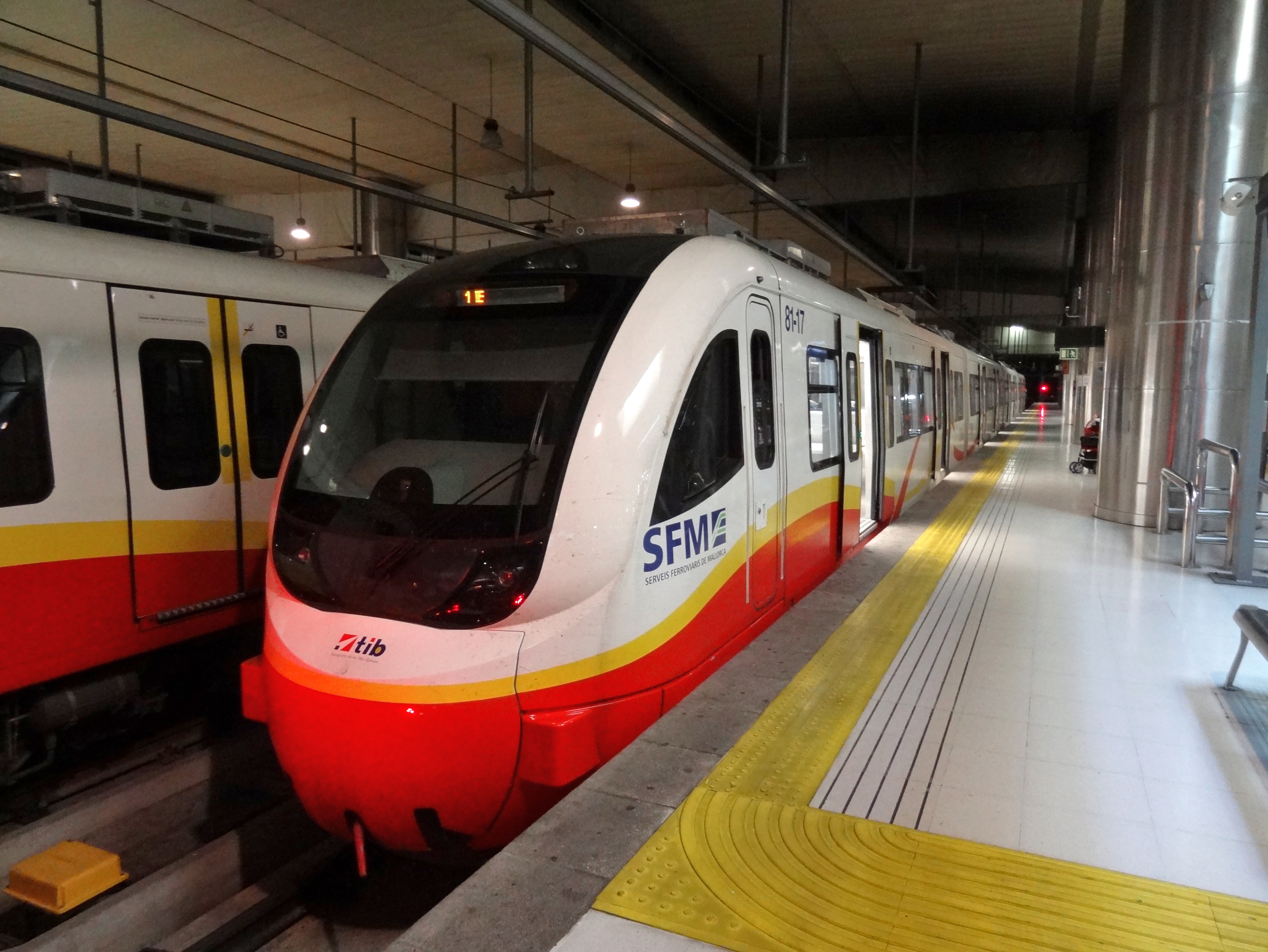 Estació Intermodal an der Plaça de Espanya in Palma, Mallorca, Spanien